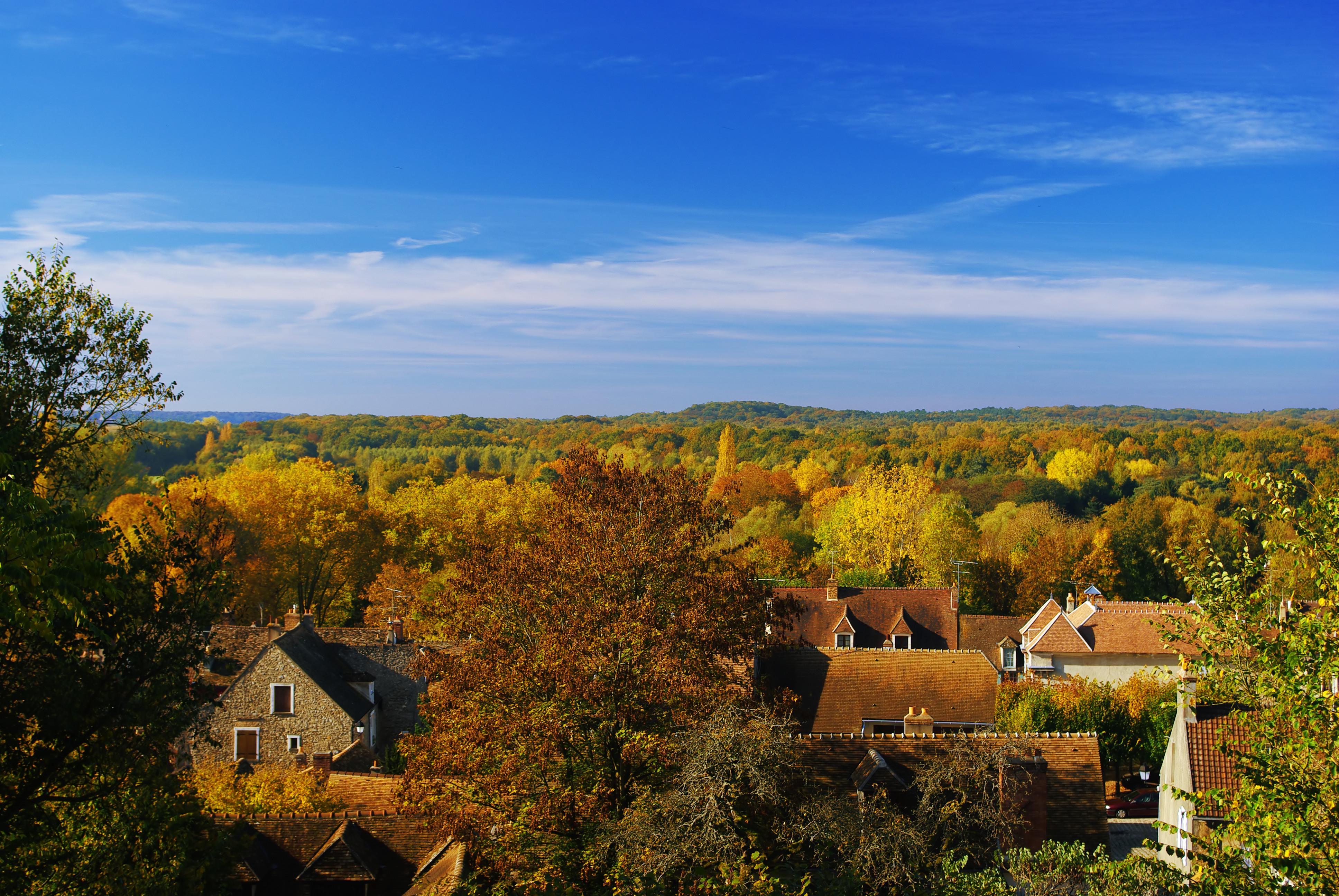 Rochefort-en-Yvelines et sa vue depuis l'église; on distingue la mairie en bas à droite et la forêt à l'arrière-plan.